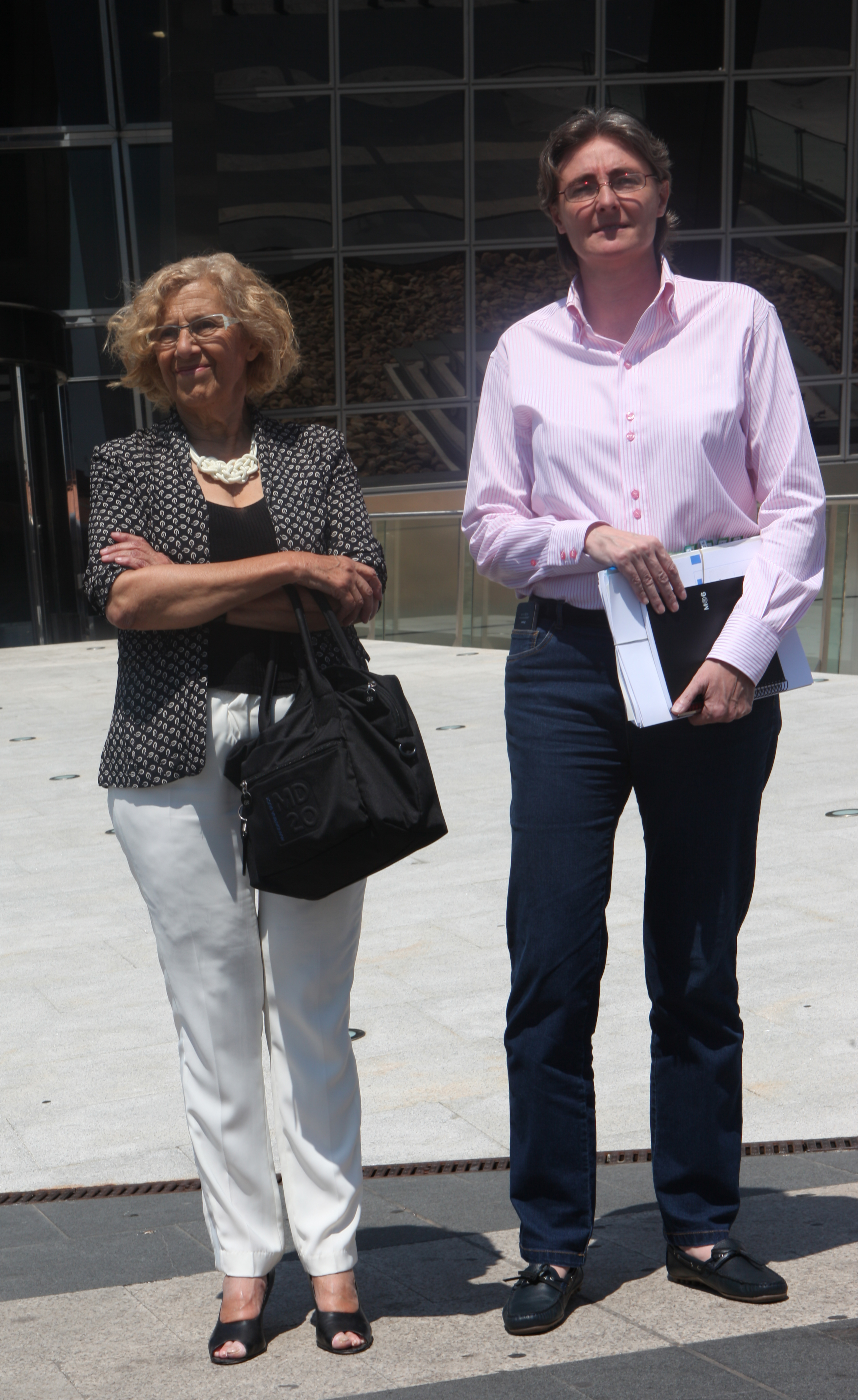 Manuela Carmena y Marta Higueras antes de asistir a la reunión con José Ignacio Goirigolzarri en la sede de Bankia en Madrid. Foto de David Arenal